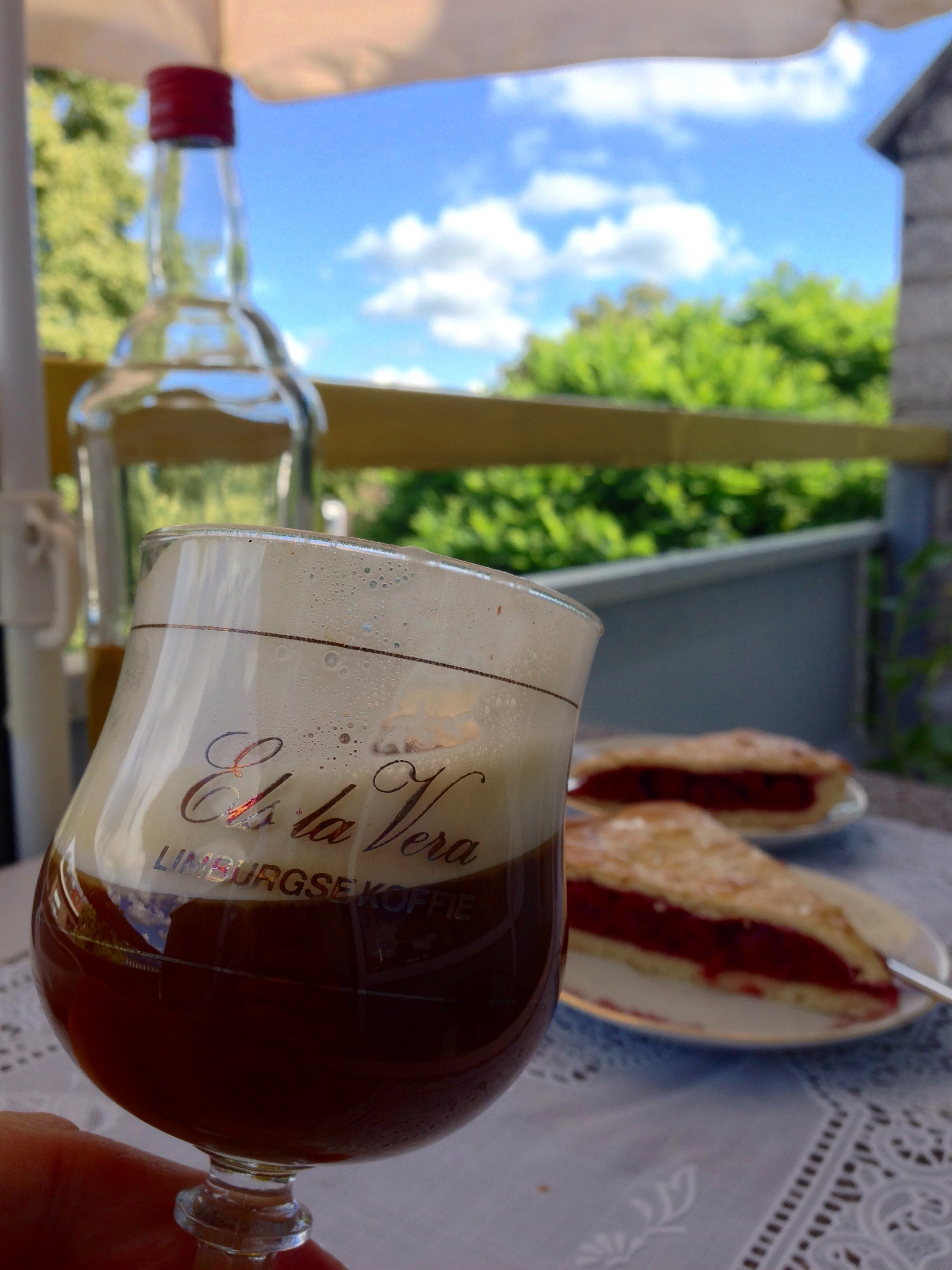 Limburgse koffie bestaat uit een combinatie van sterke koffie en de van oorsprong Limburgse kruidenbitter Els la Vera, afgemaakt met een toef slagroom. Optioneel verrijkt met gember, kaneel en cacaopoeder.